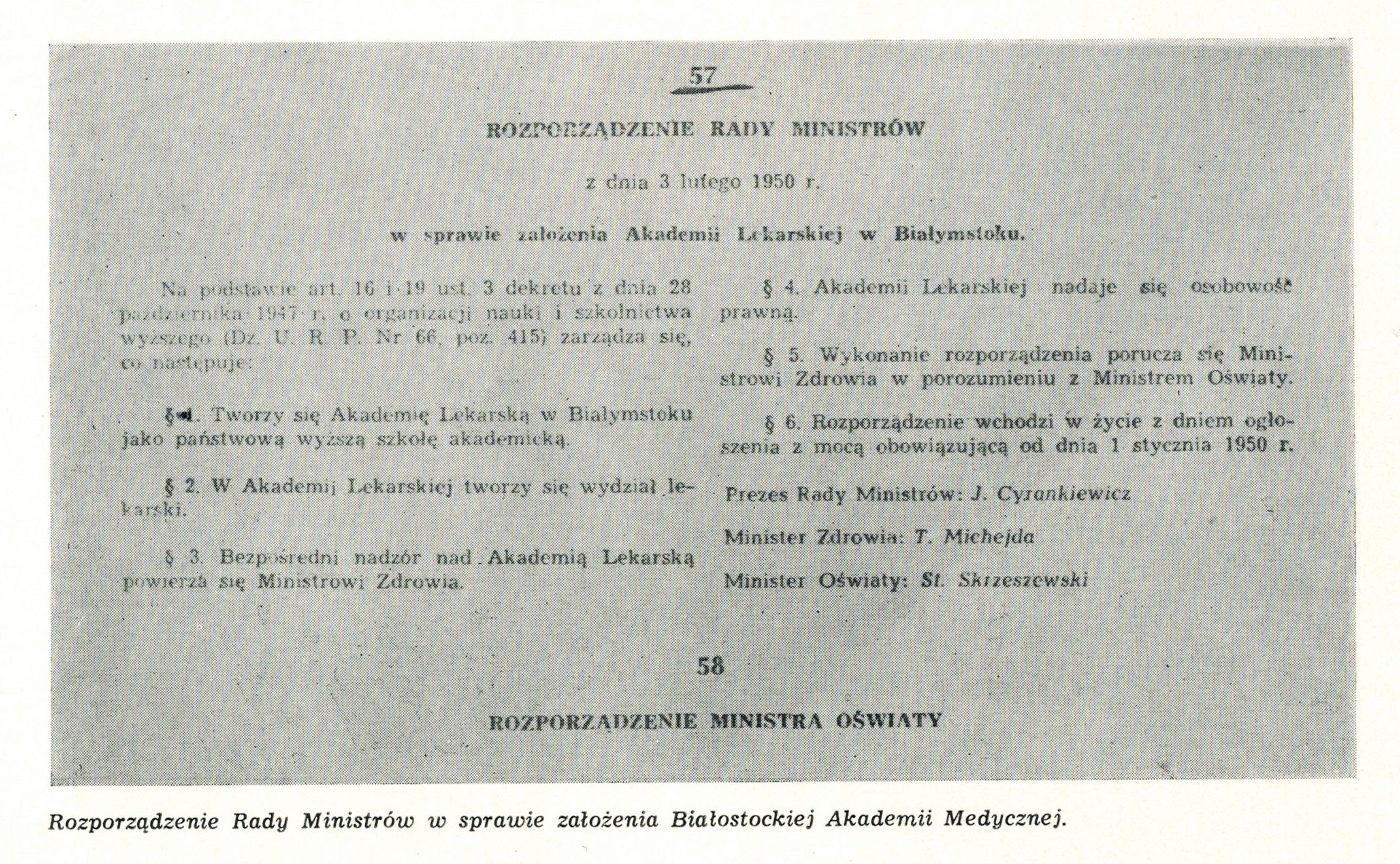 1950 założenie Akademii Lekarskiej w Białymstoku